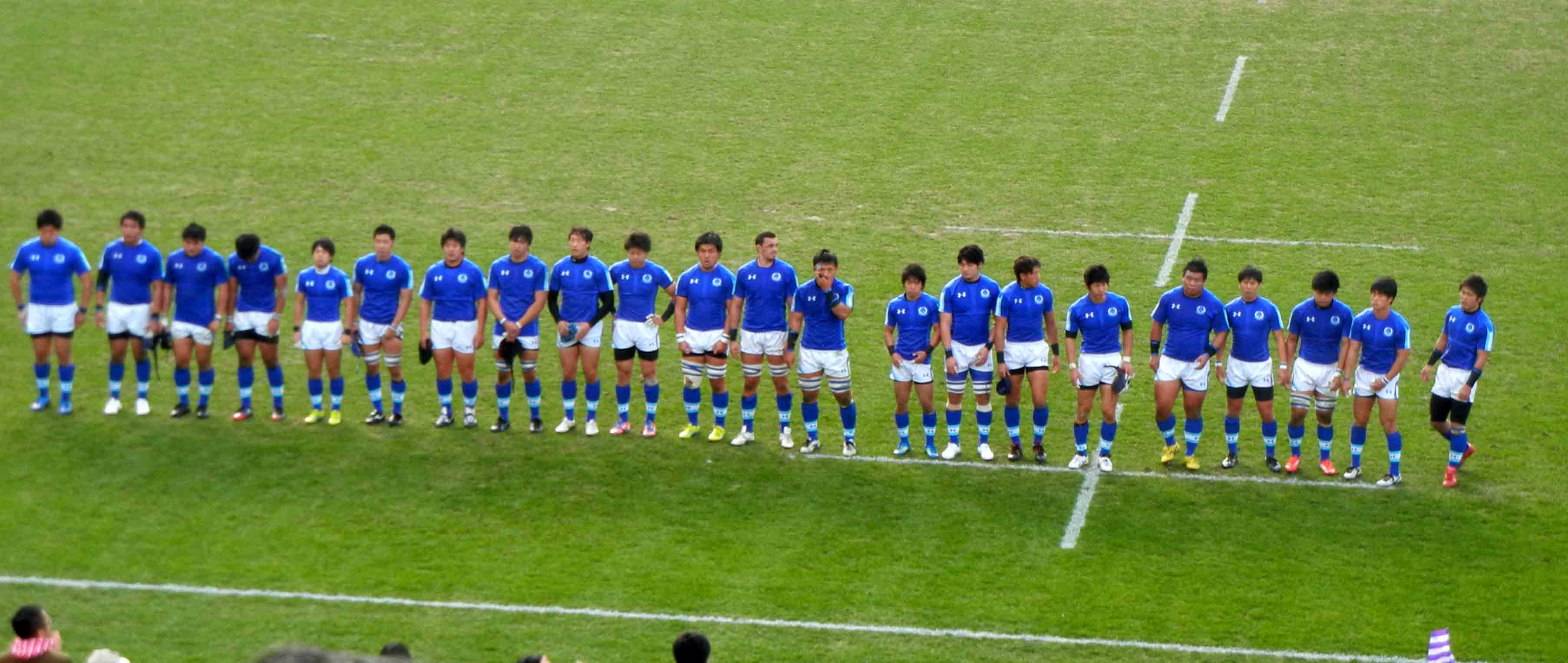 試合後の東海大学の選手達